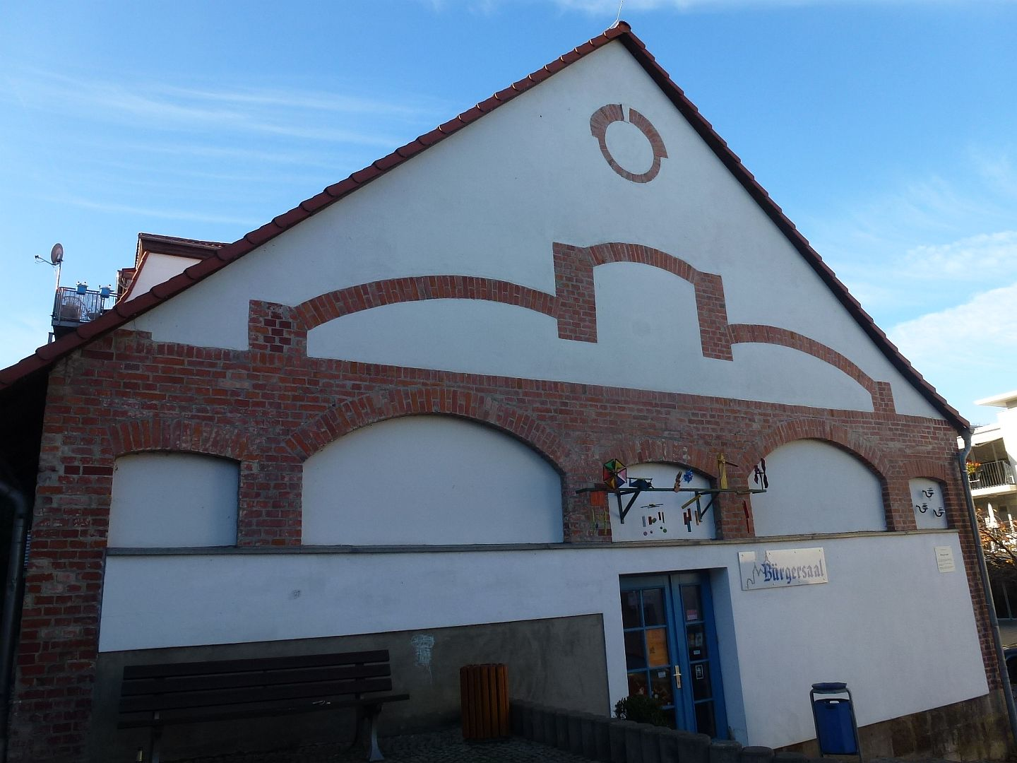 Ehem. E-Werk in Mücheln, jetzt Bürgersaal